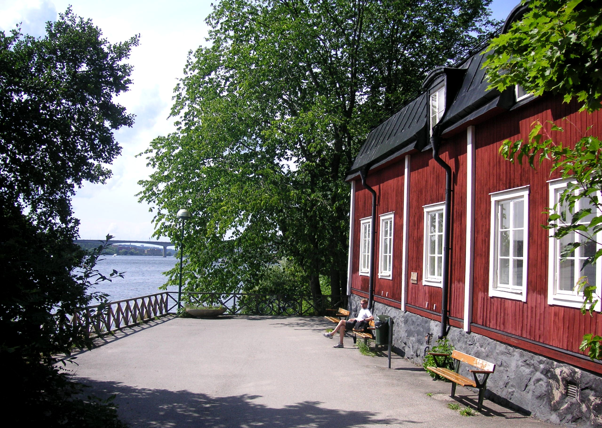 Mårten Triewalds malmgård på Marieberg i Stockholm